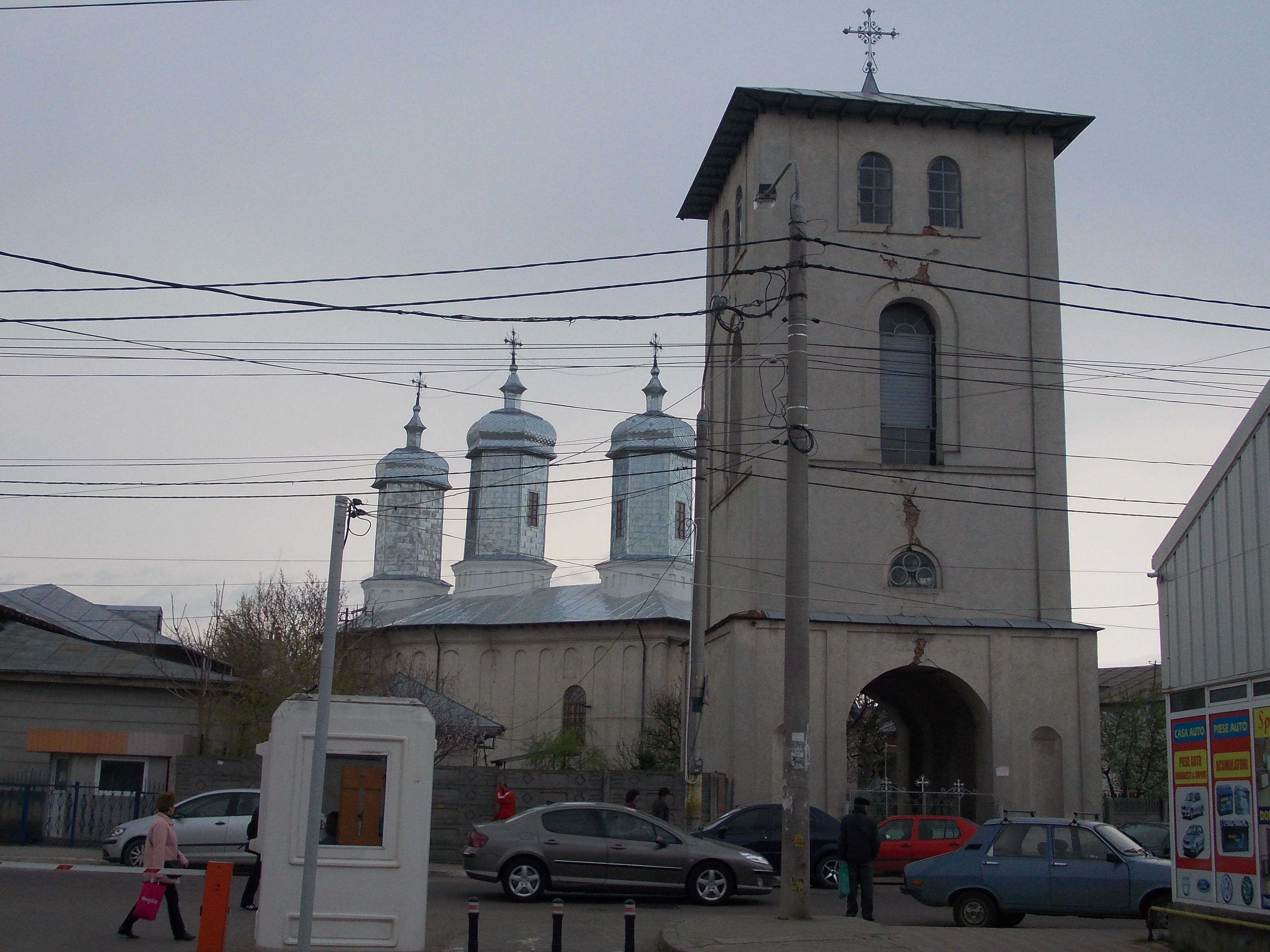 clopotniţă şi biserică în Bârlad 02